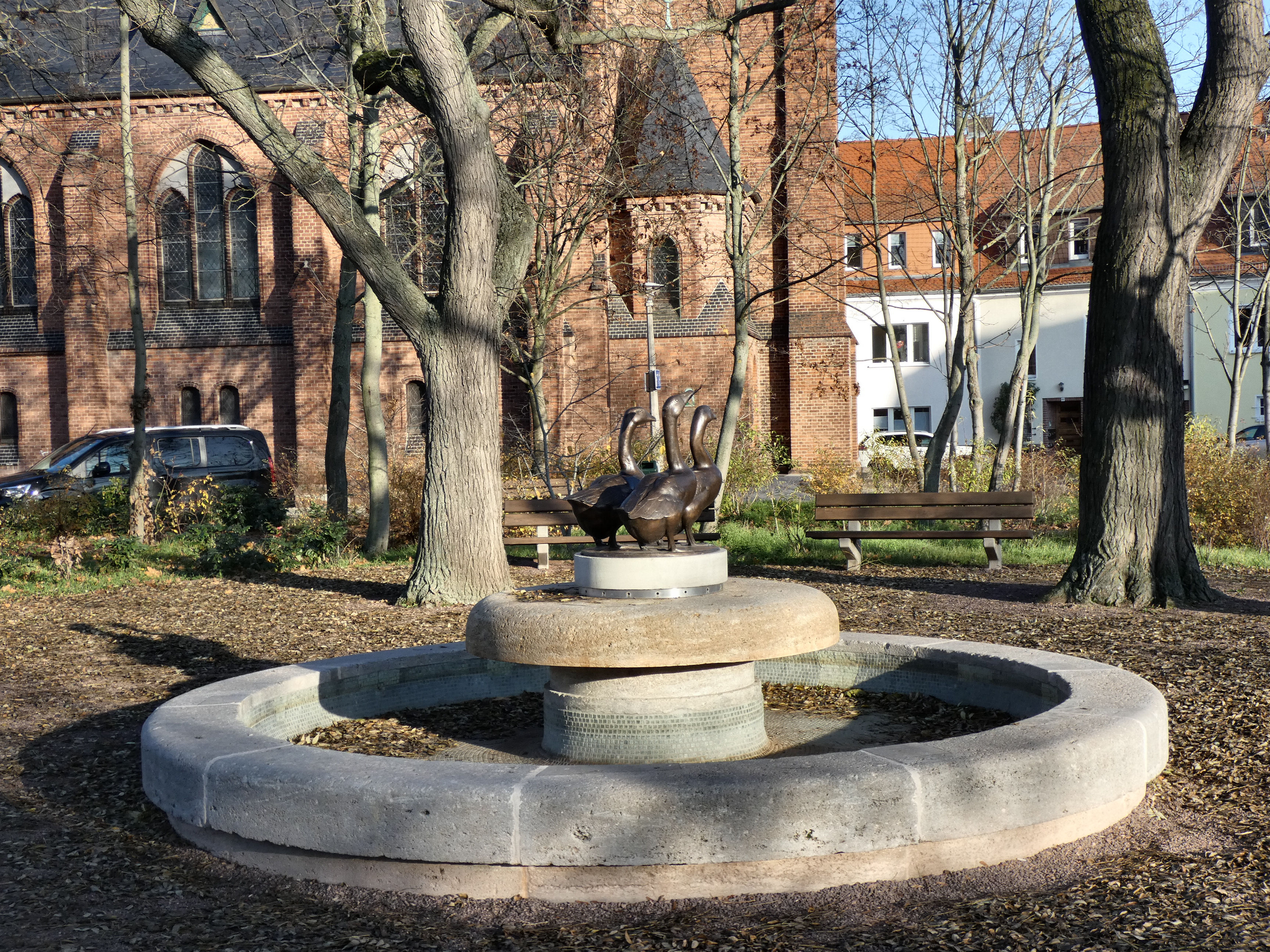 Gänsebrunnen in Kröllwitz, Halle (Saale)